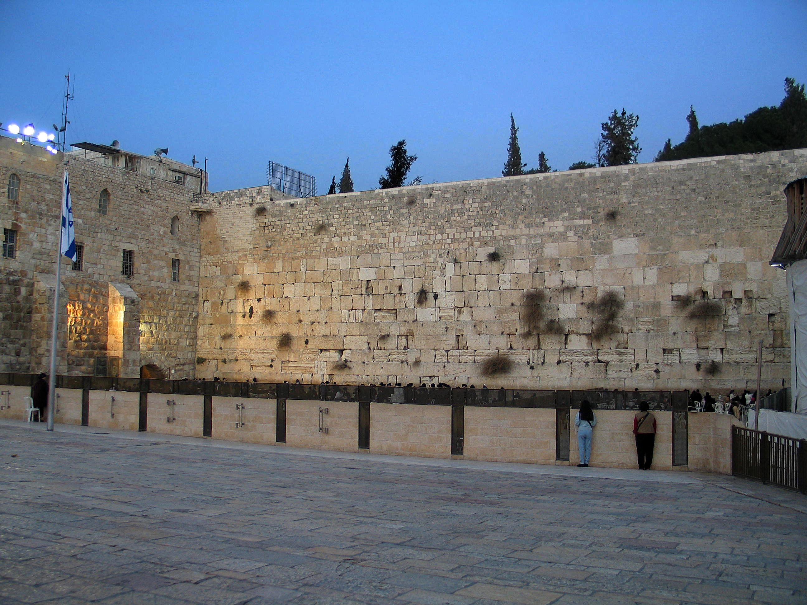 הכותל המערבי Ściana Płaczu-jedyna pozostałość 2 Świątyni Jerozolimskiej حائط البراق